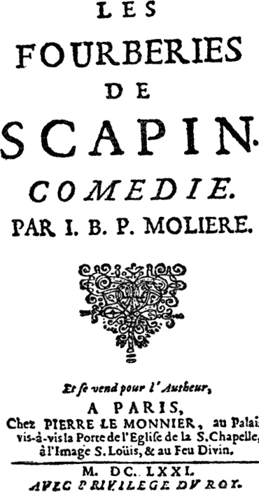 Front page of Les Fourberies de Scapin by Molière (1622-1673)